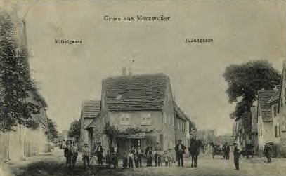 Ansichtskarte mit der Judengasse in Mertzwiller